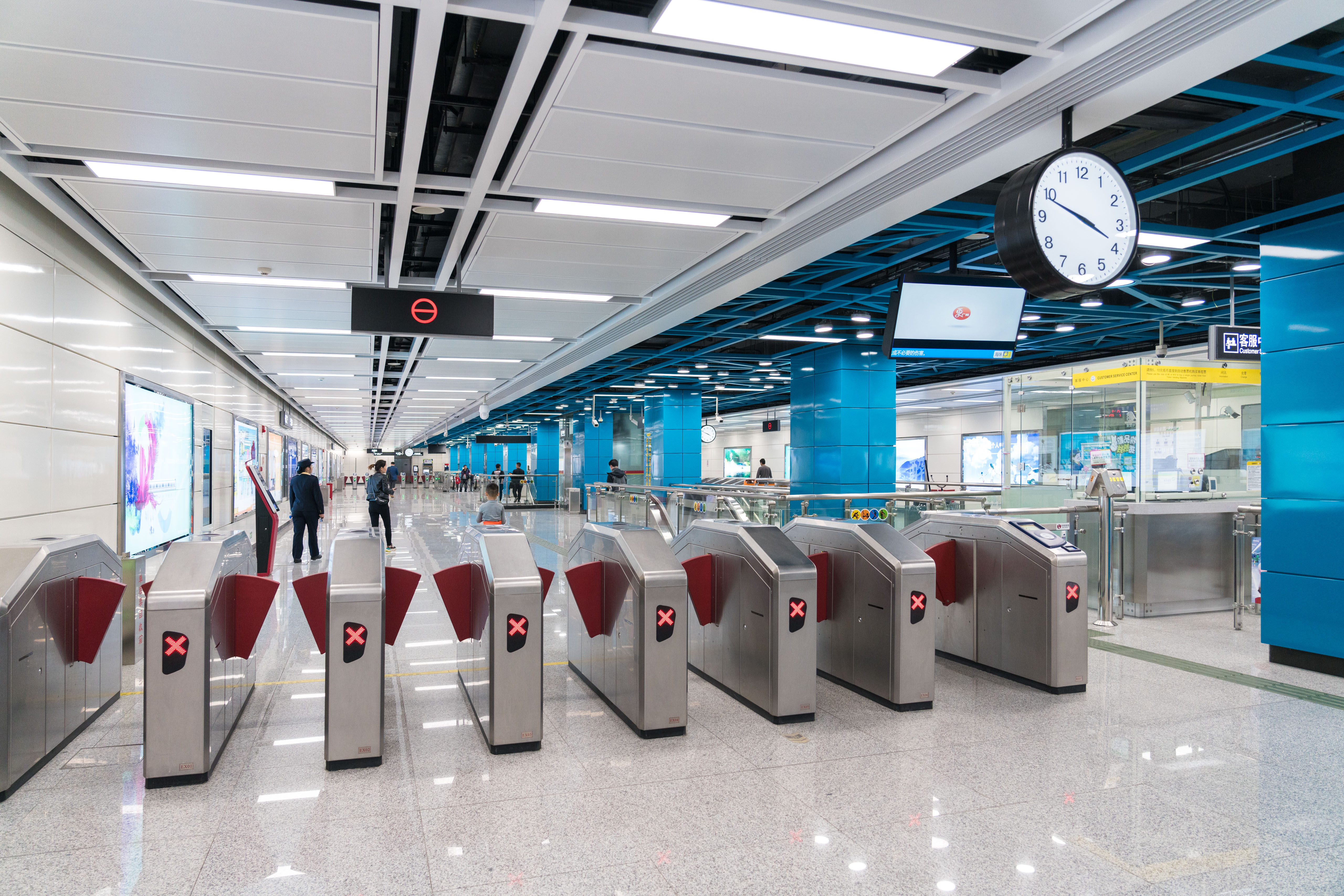 广州地铁9号线清塘站站厅